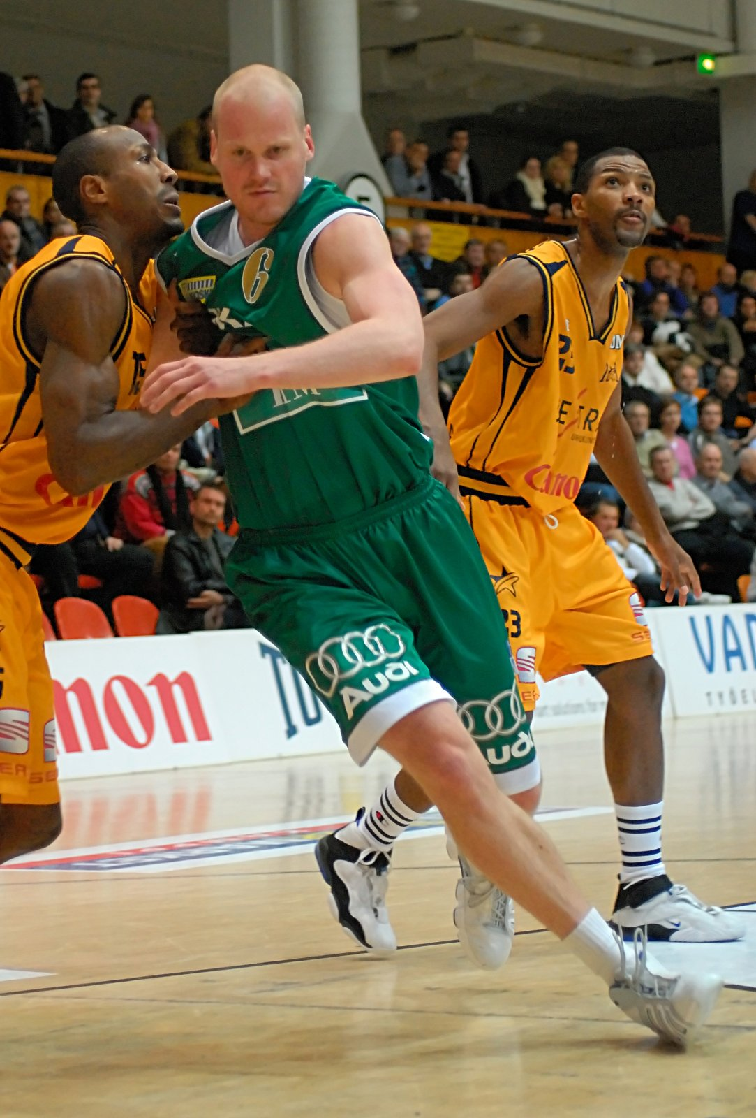 Jukka Matinen playing for Honka in Helsinki against Torpan Pojat